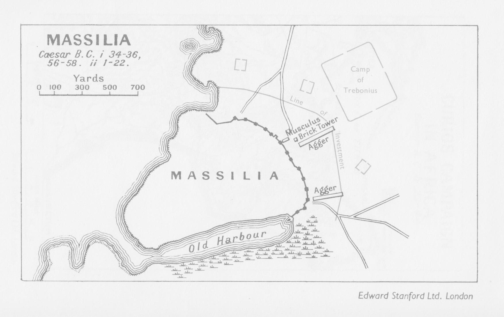 המצור על מאסיליה, 49 לפנה"ס